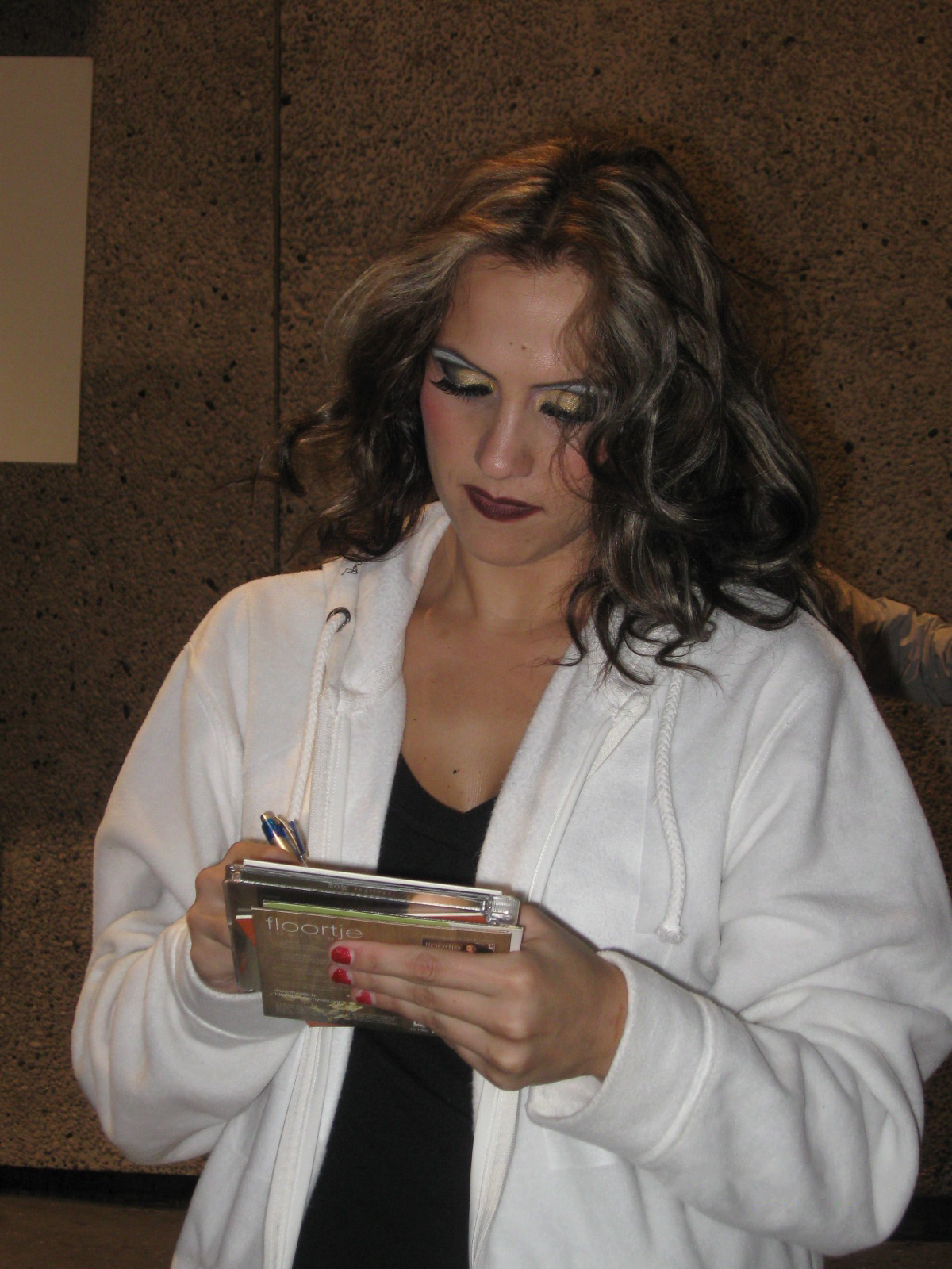 Floortje Smit (Amsterdam, 16 juli 1983) is een Nederlands zangeres en verliezend finalist van de talentenshow Idols III in 2006.